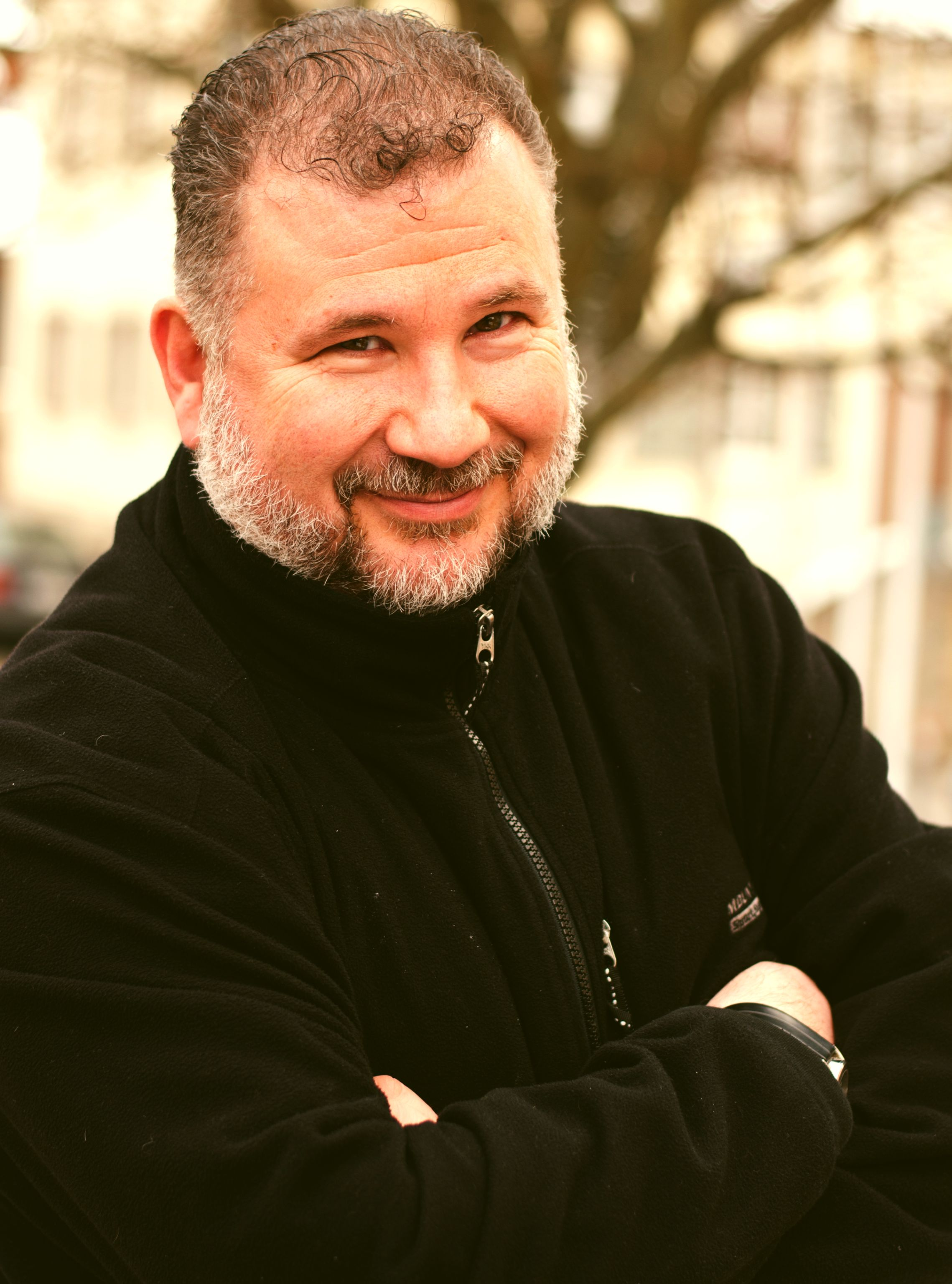 Hermann Vief